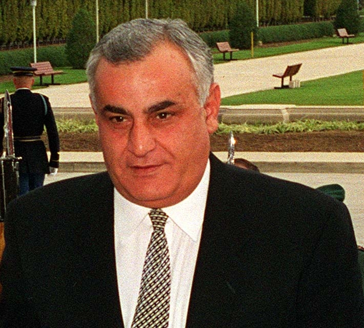 Minister of Defense Yitzhak Mordechai